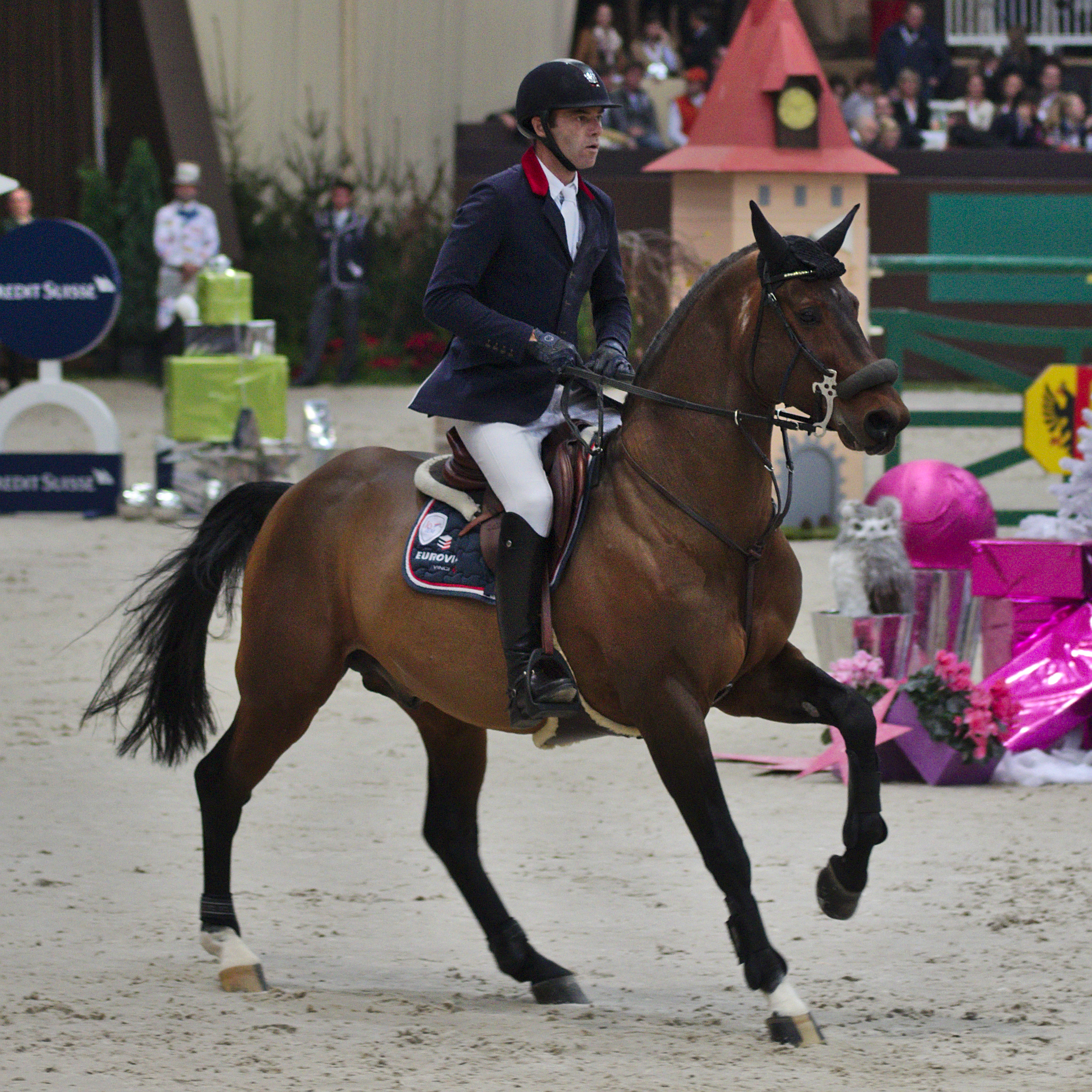 CHI Genève 2013 - 20131213 - Aymeric de Ponnat et Armitages Boy